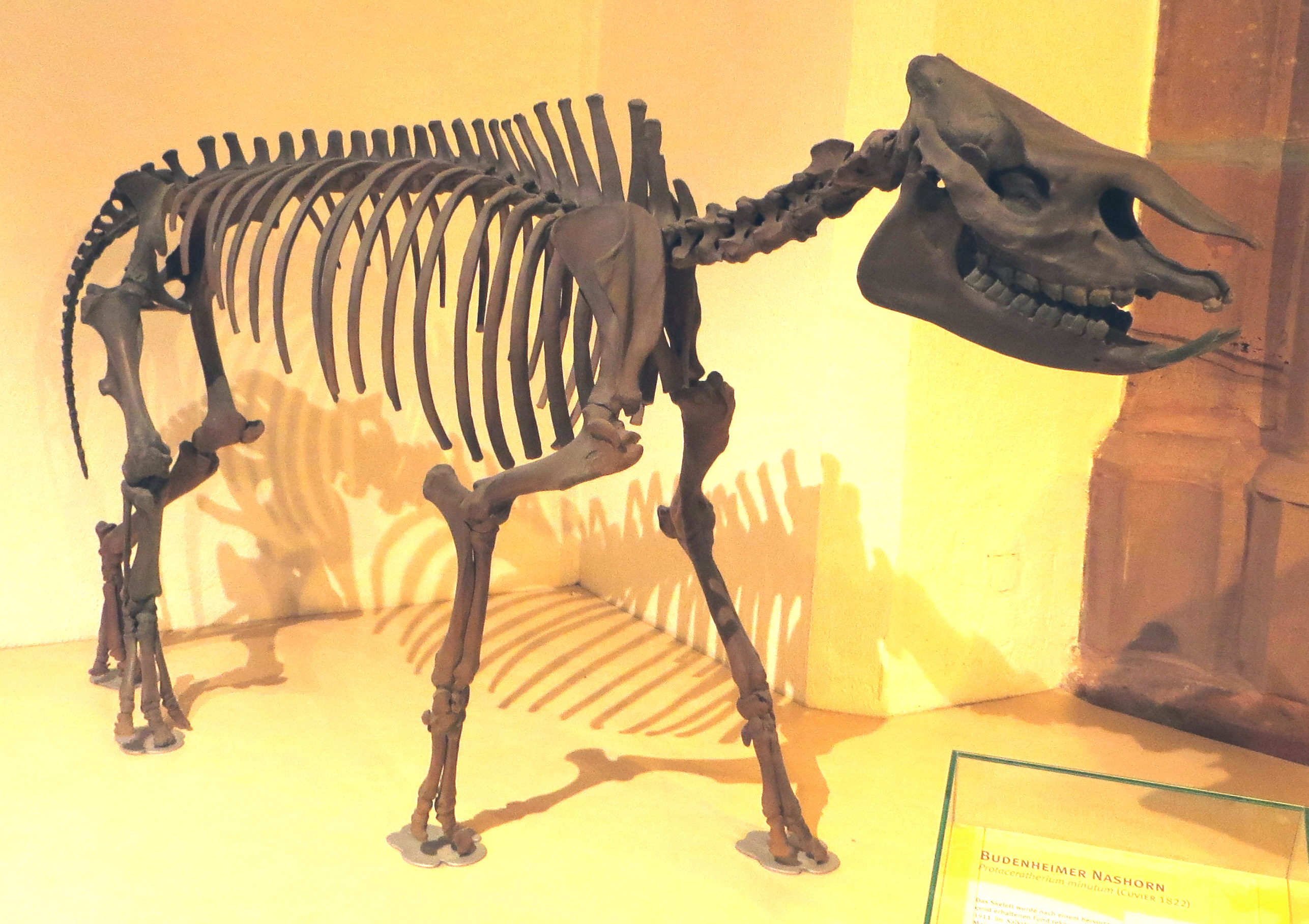 Fossil of Protaceratherium- Took the picture at Natural History Museum, Mainz